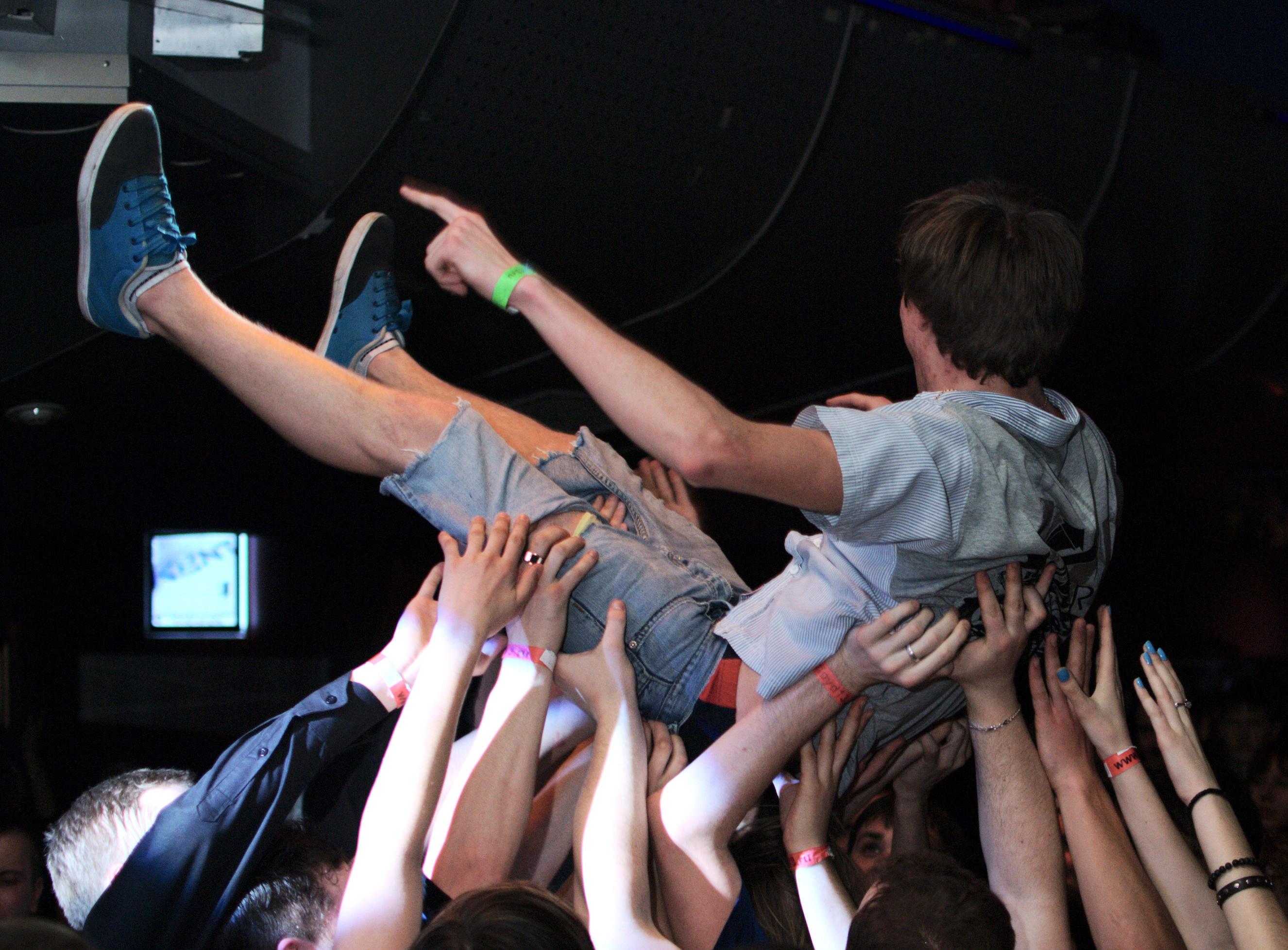 Фотография с концерта группы 9 miles в Саранске